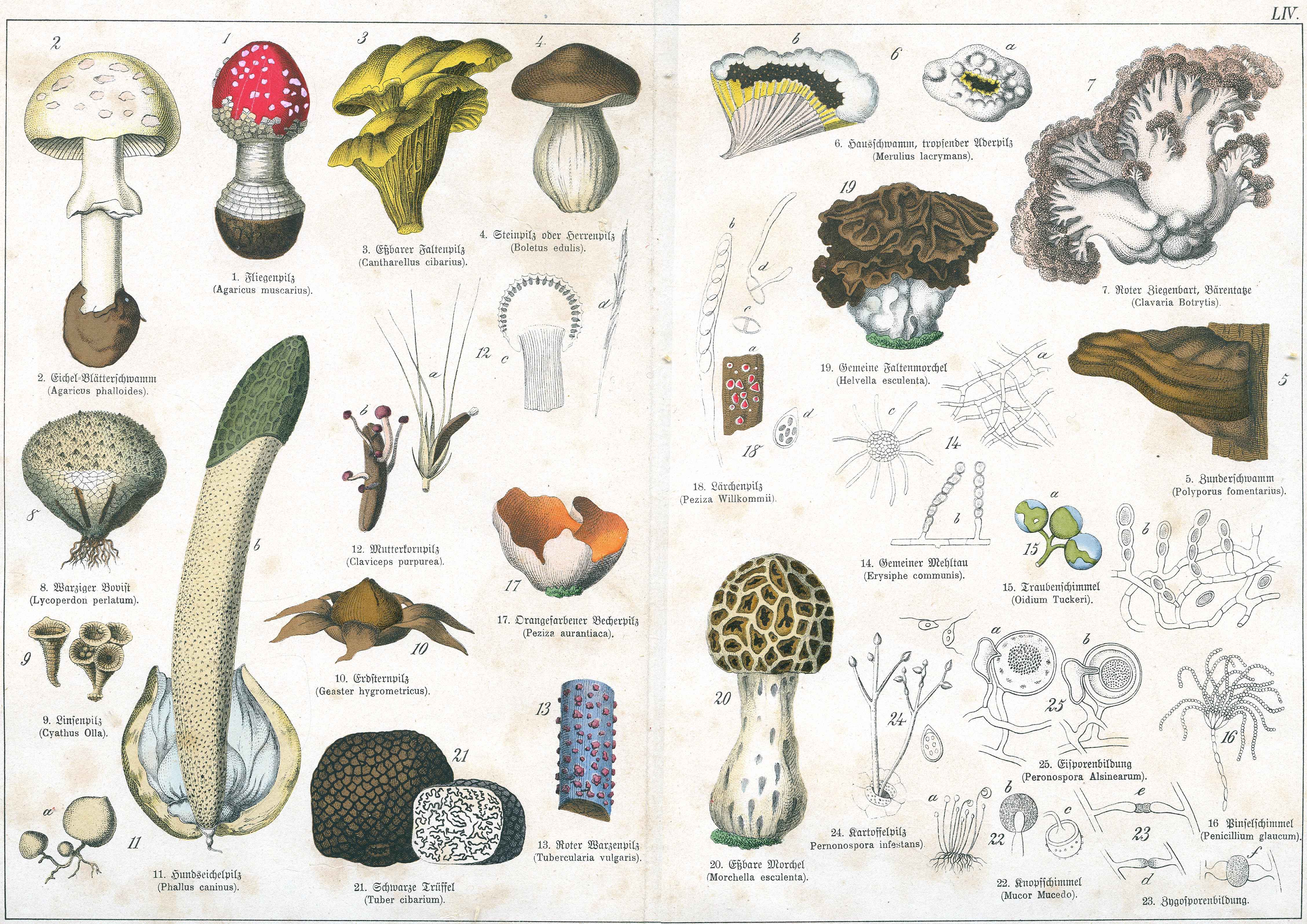 illustration from «Naturgeschichte des Pflanzenreichs», table LIV